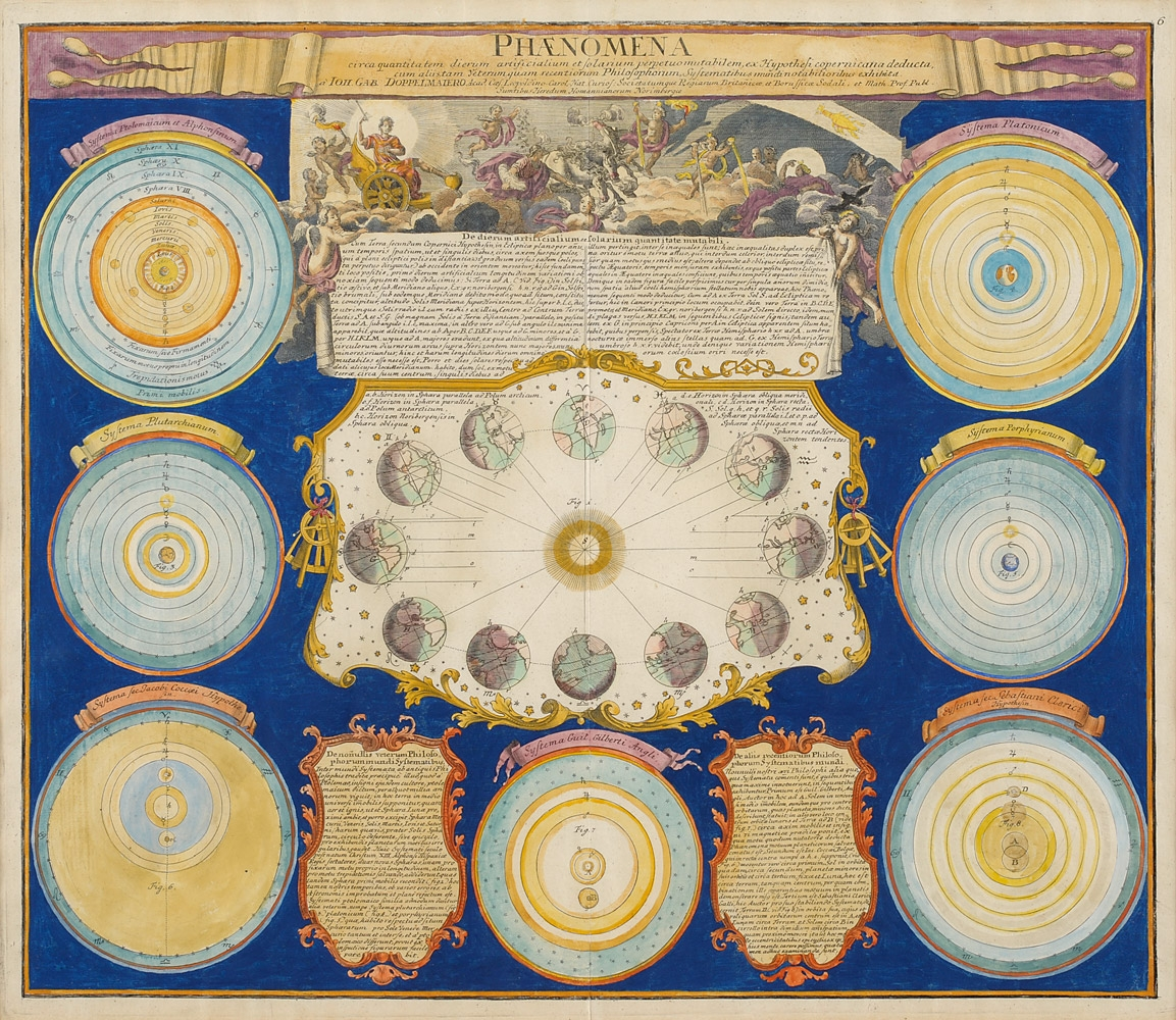 PHÆNOMENA: circa quantitatem dierum artificialium et solarium perpetuo mutabilem, ex Hypothesi copernicana deducta, cum aliis, tam Veterum, quam recentiorum Philosophorum, Systematibus mundi notabilioribus / exhibita à Ioh. Gab. Doppelmaiero